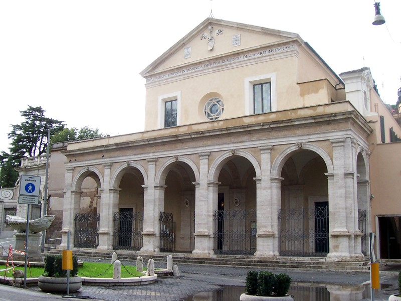 Roma - Chiesa di S. Maria in Domnica